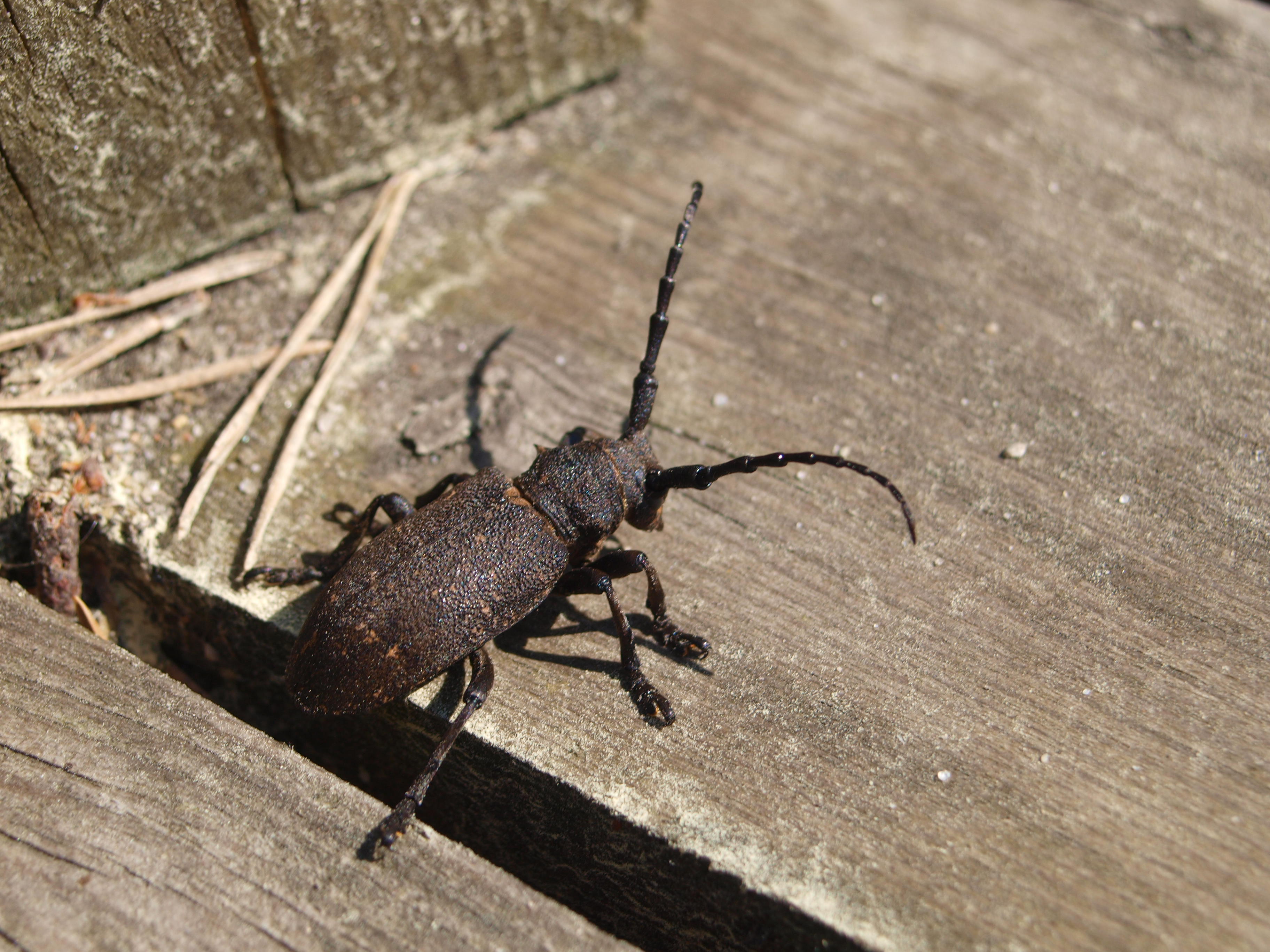 Juuresikk (Lamia textor)